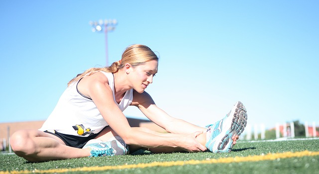 스트레칭은 운동 전에 몸을 이완하는데 도움을 준다.